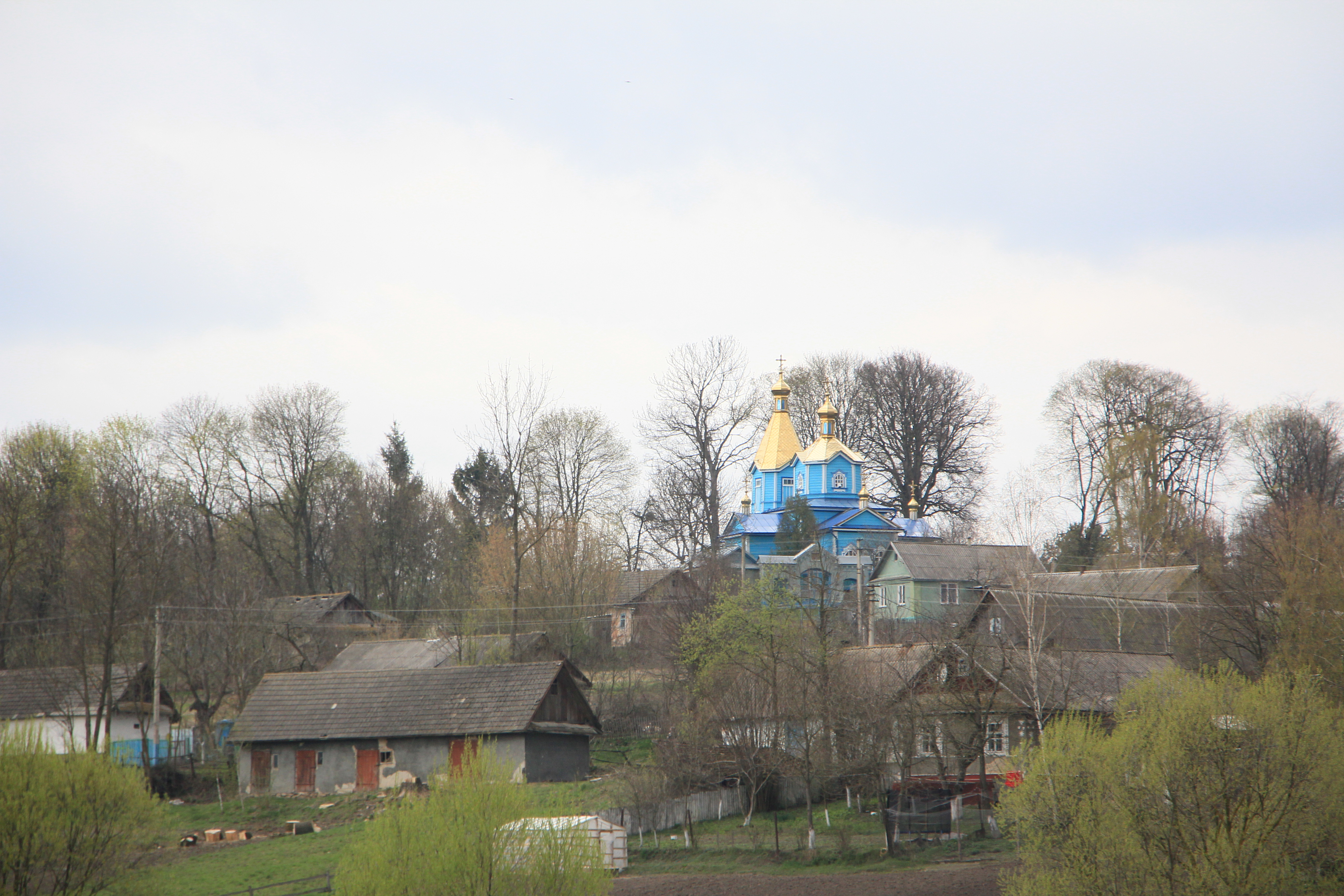 Дерев'яна церква в селі Людвище Шумського району, Тернопільської області